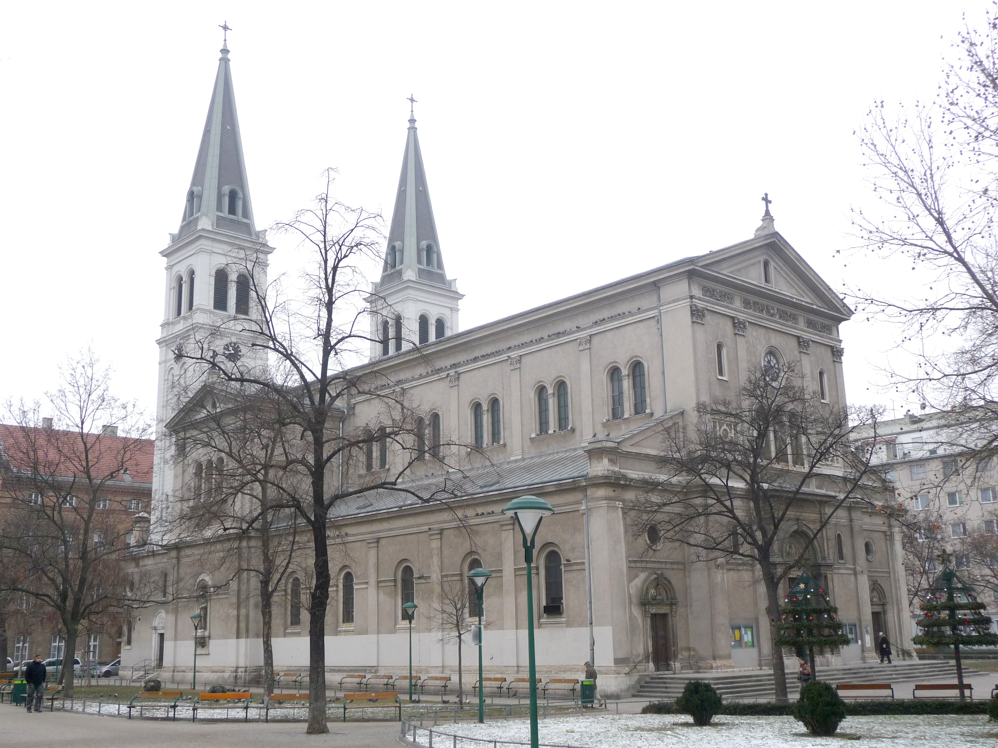 Pfarrkirche St. Johann, Favoriten, Wien